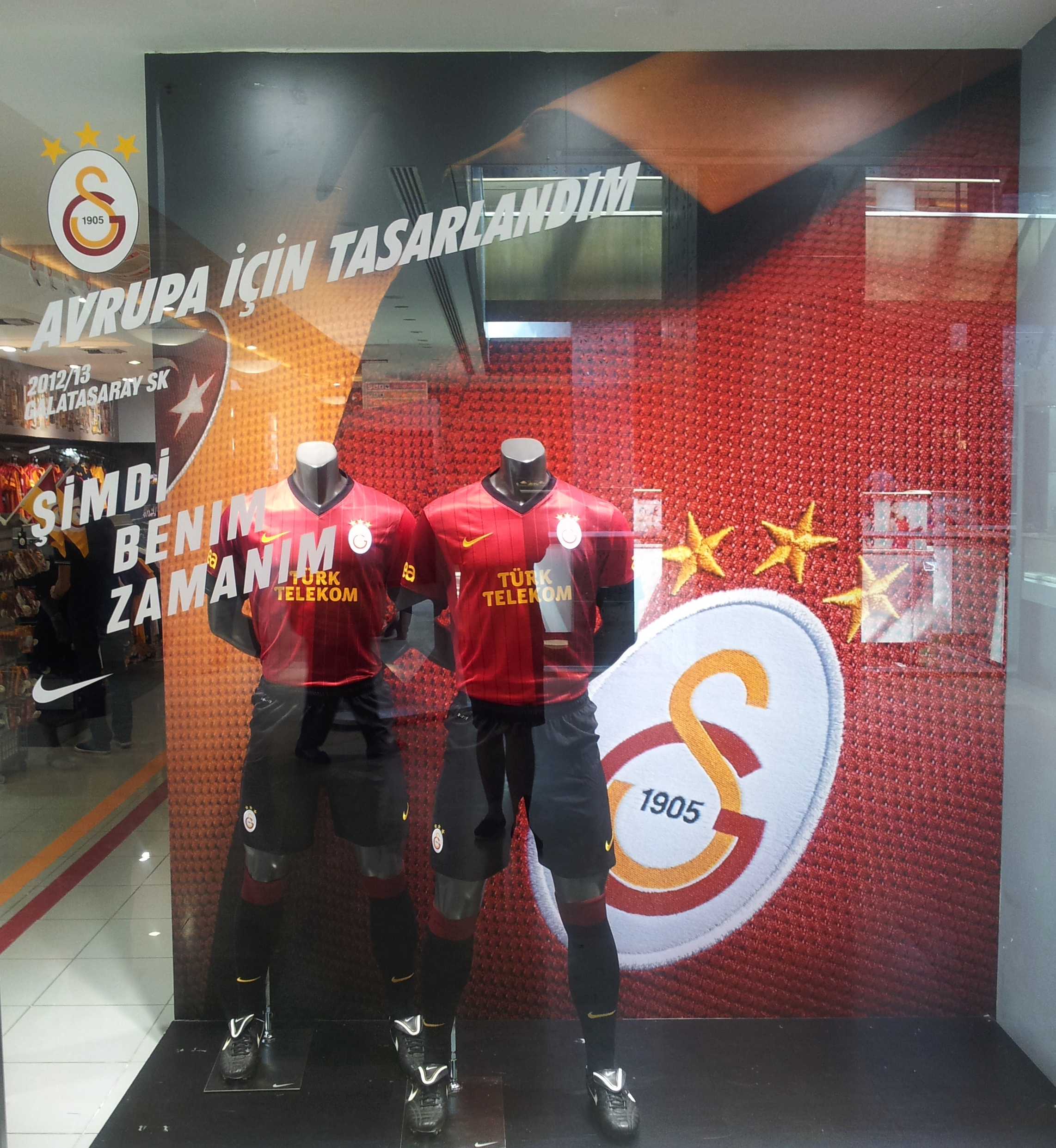 GS Store'da Galatasaray'ın yeni formaları